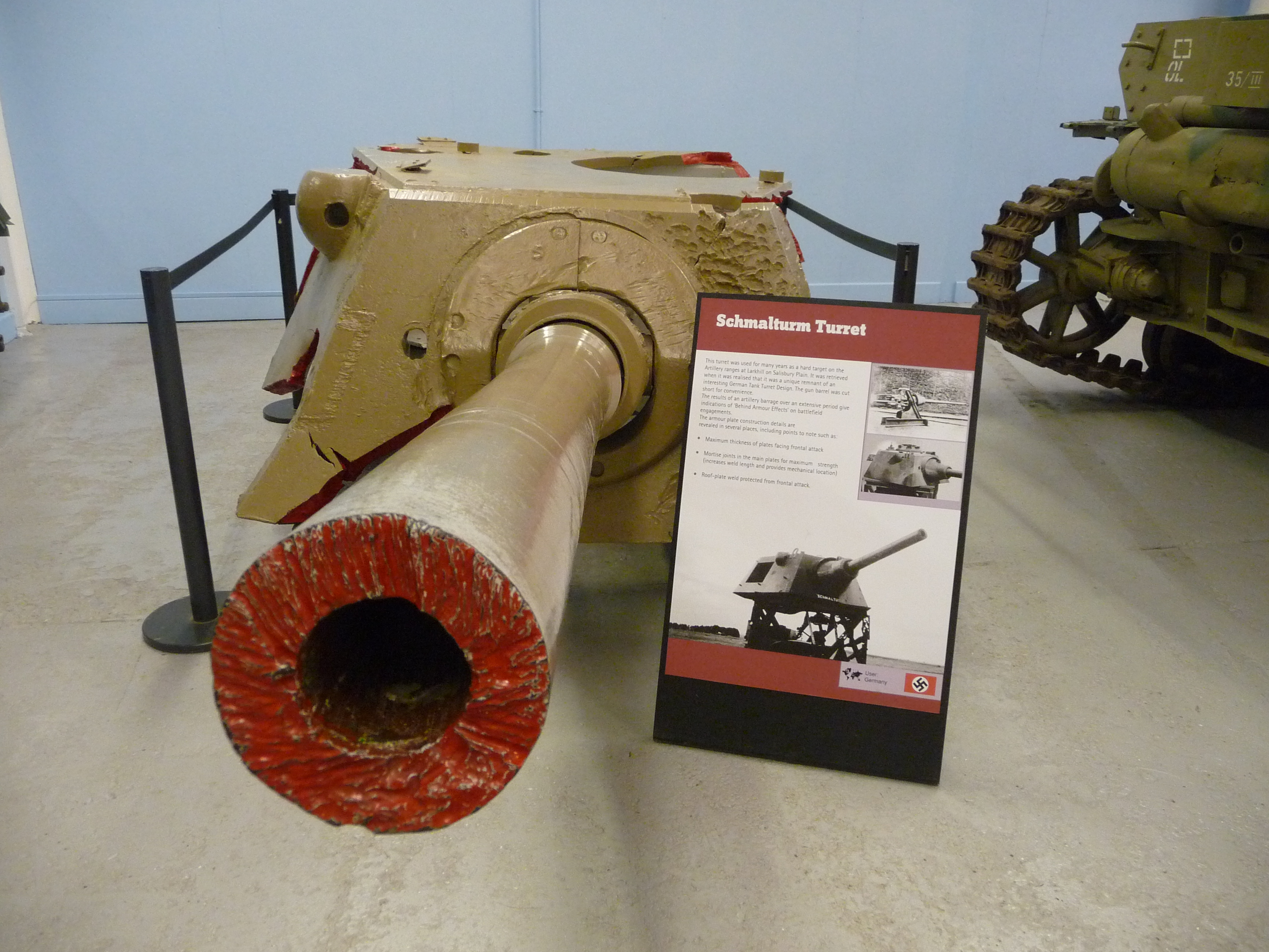 Schmalturm Turret